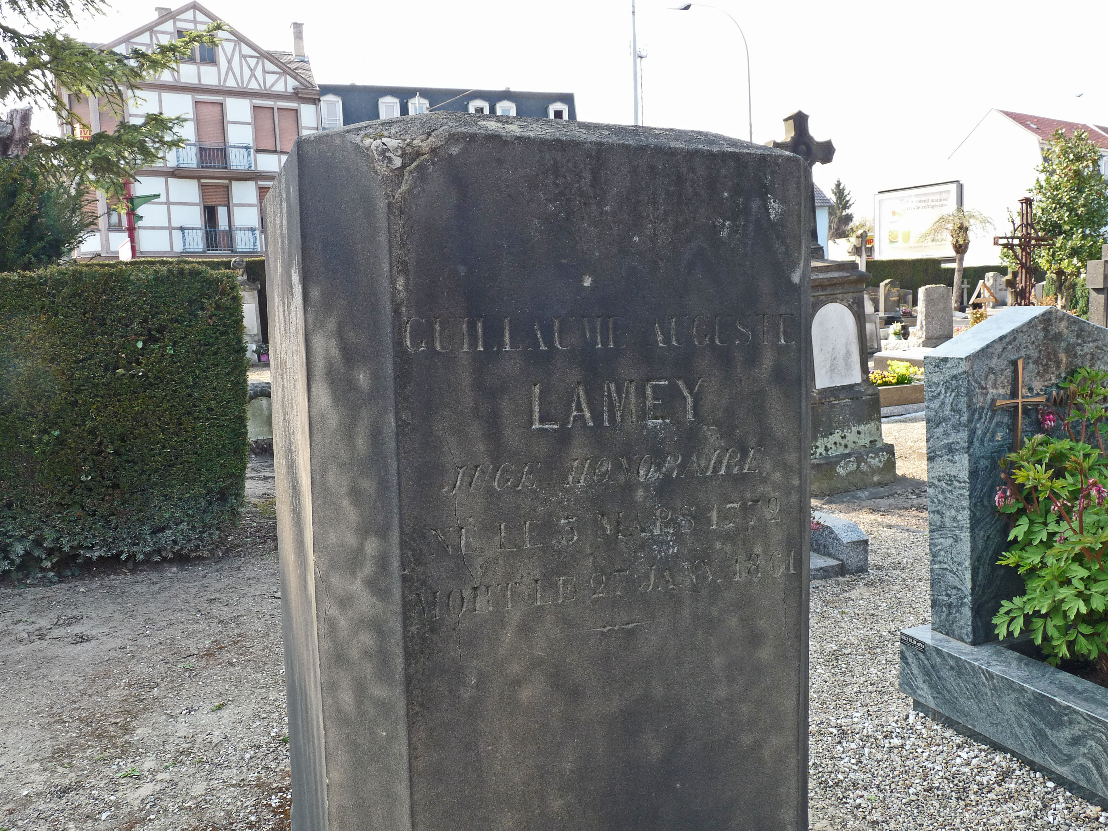 Monument d'Auguste Lamey (1772-1861), magistrat et poète, au cimetière Sainte-Hélène de Strasbourg.